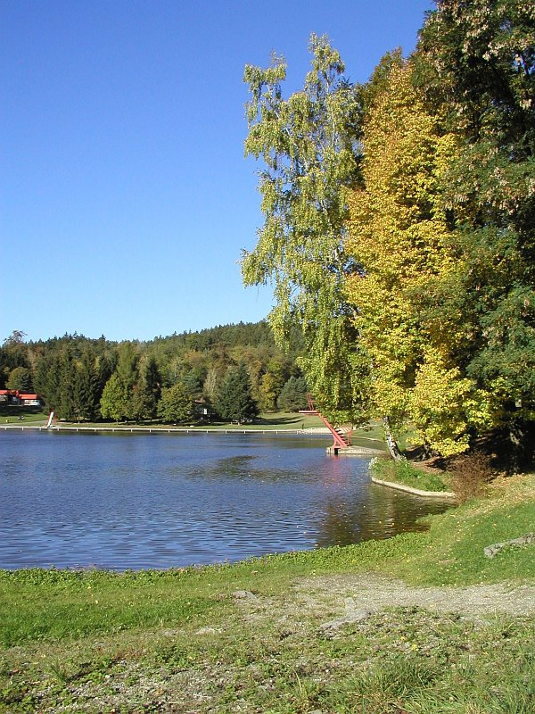 Foto by Stanislav Mrazek concessa in licenza GFDL Categoria:Immagini esclusivamente in GNU FDL